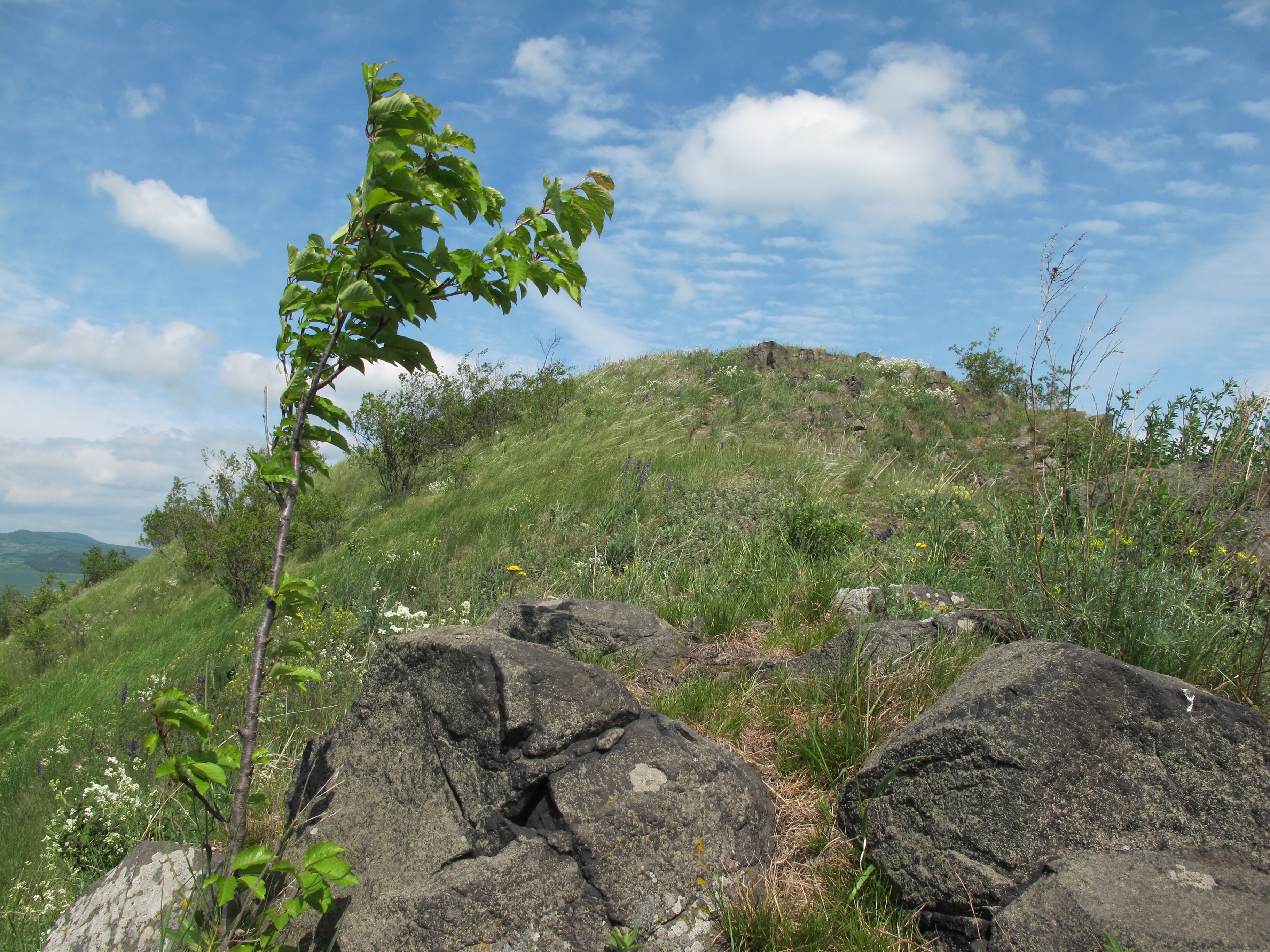 Vrchol Brníku (471 m) v Českém středohoří.